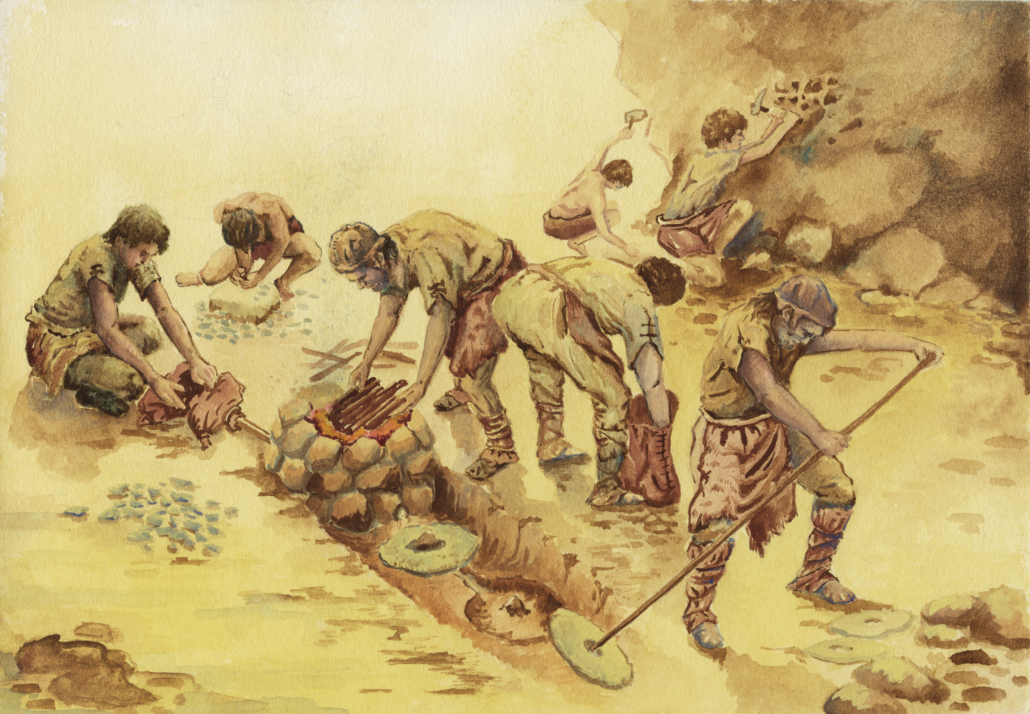 Tot i l'escasedat de minerals al territori valencià, l'activitat metal·lúrgica es constata amb restes primer de coure, i posteriorment bronze. Procés de fundició i elaboració de peces metàl·liques. (F. Chiner).